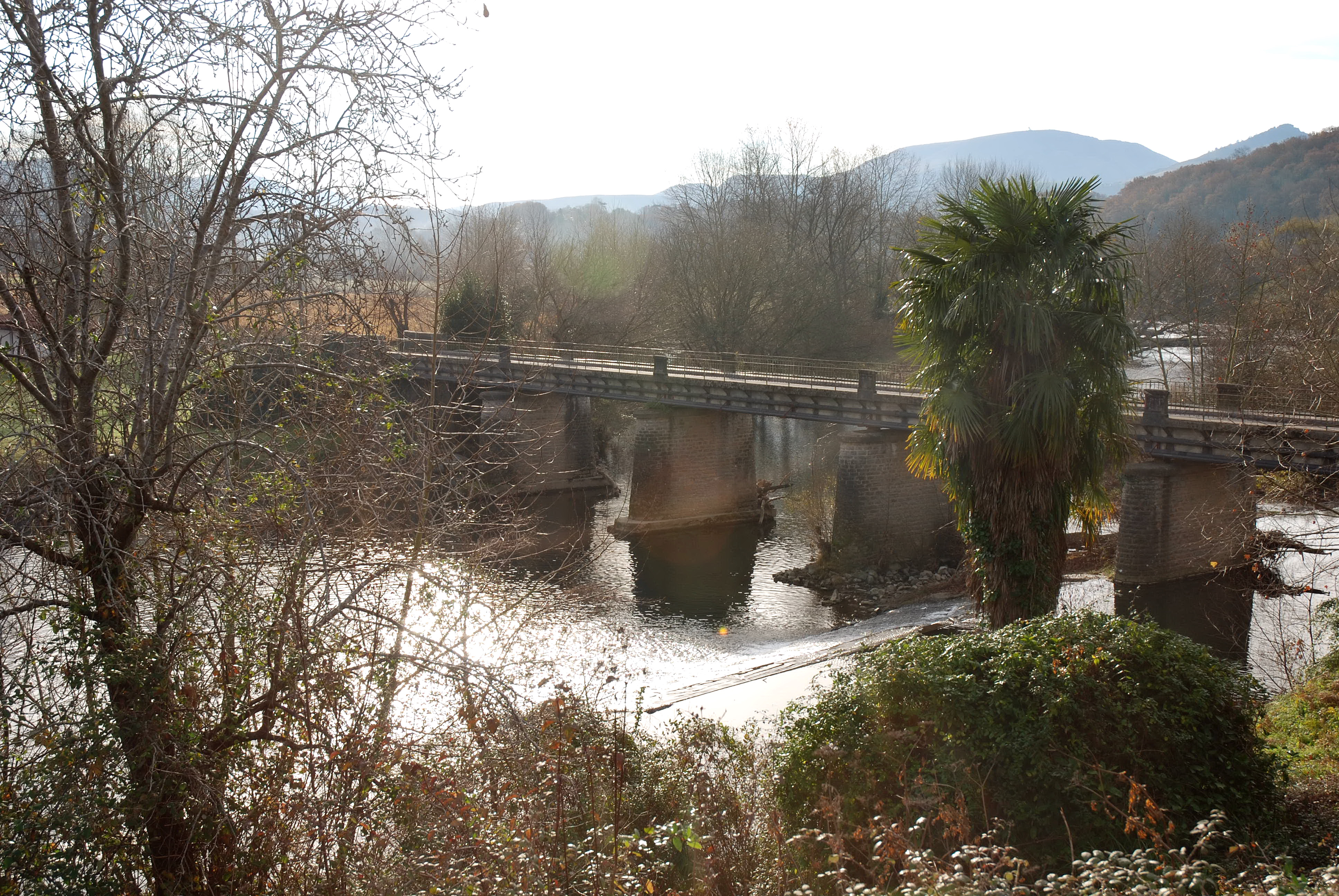 Ustaritz, pont sur la Nive. Photo prise le 31/12/06 par Harrieta171